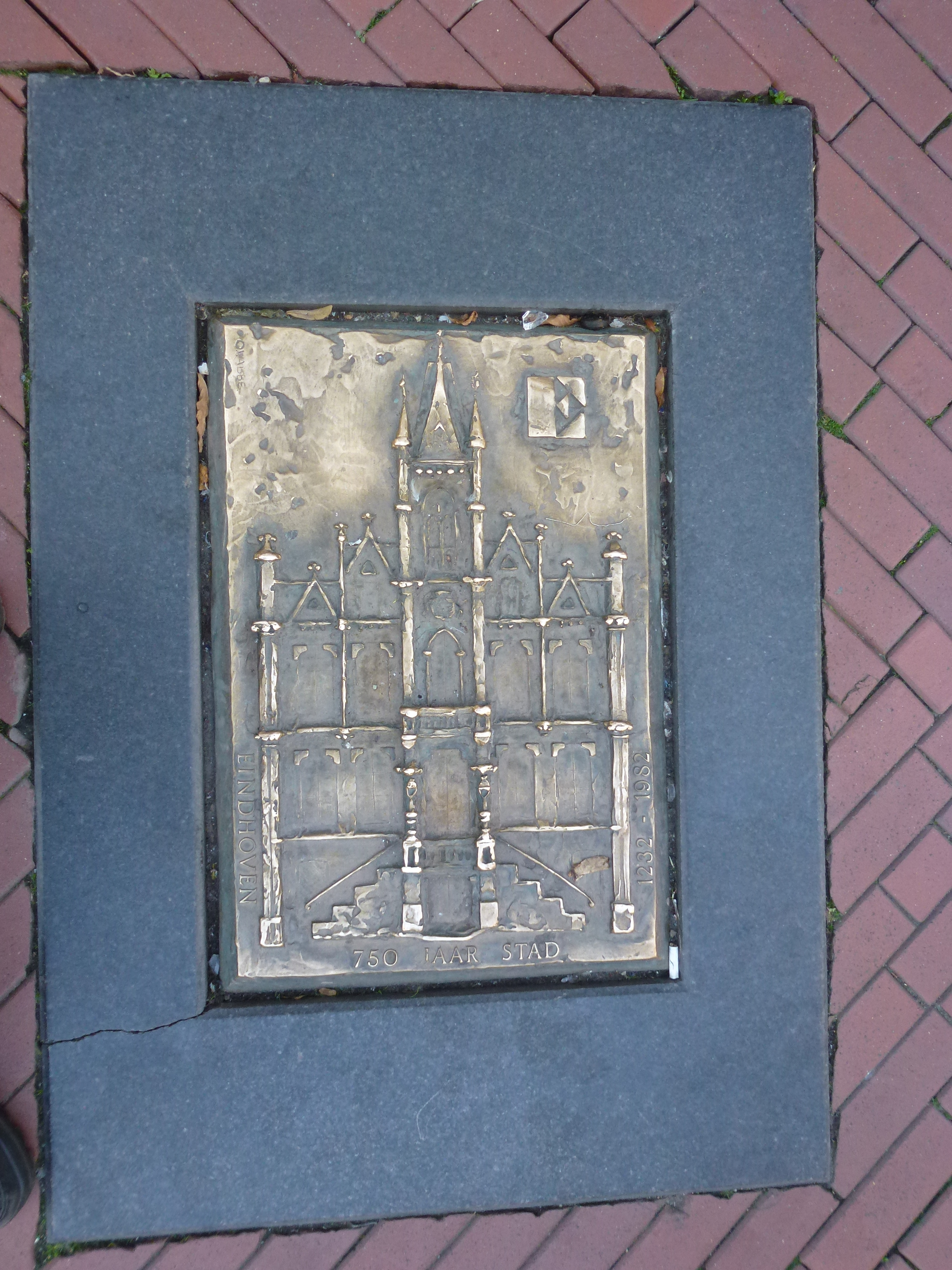 Oud-stadhuis, Olly van Abbe - Rechtestraat Eindhoven